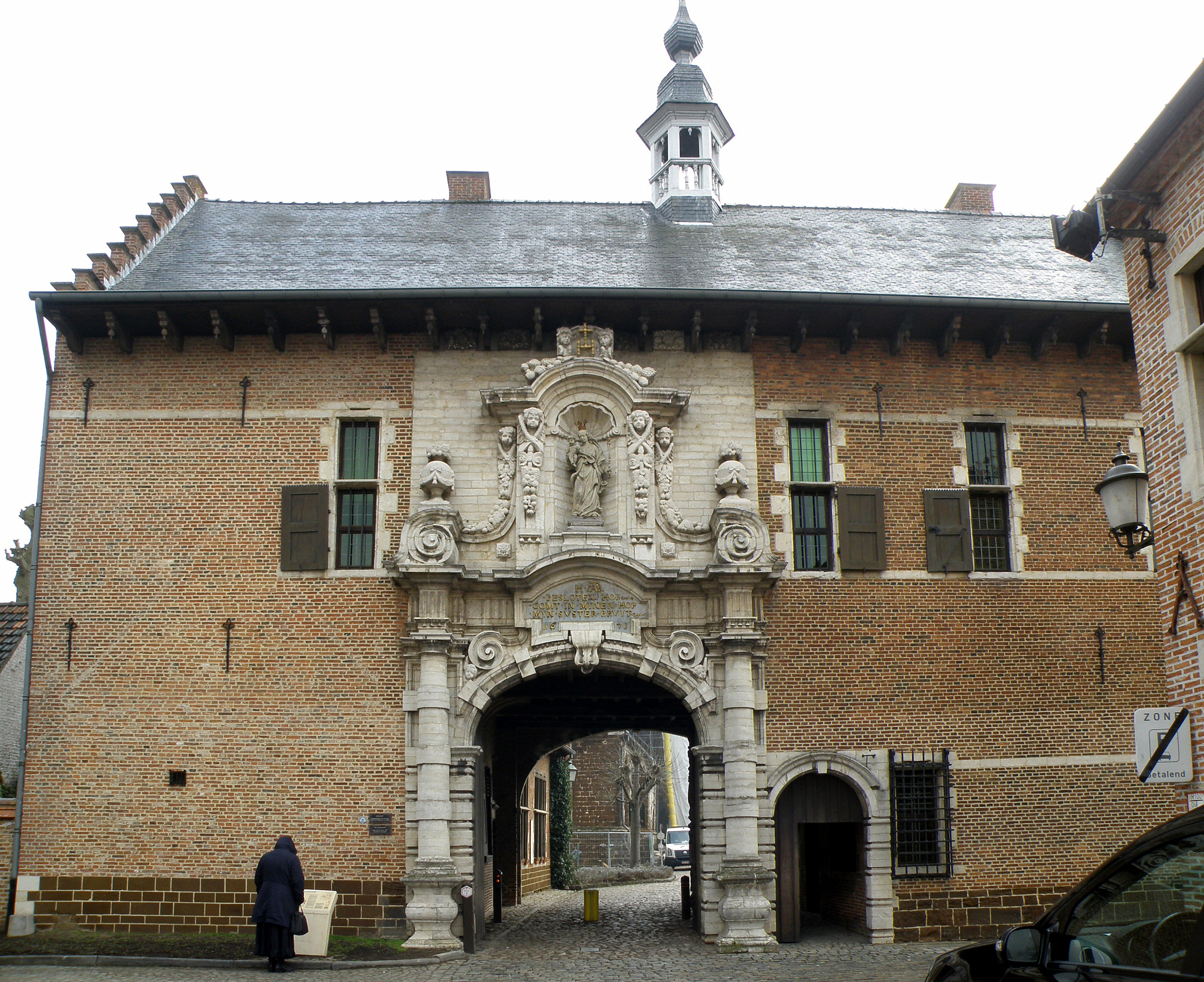 Diest (prov. de Brabant-Flamand, Belgique). Portail d’entrée du béguinage, datée 1671. Façade avant (tournée vers l'extérieur du béguinage).